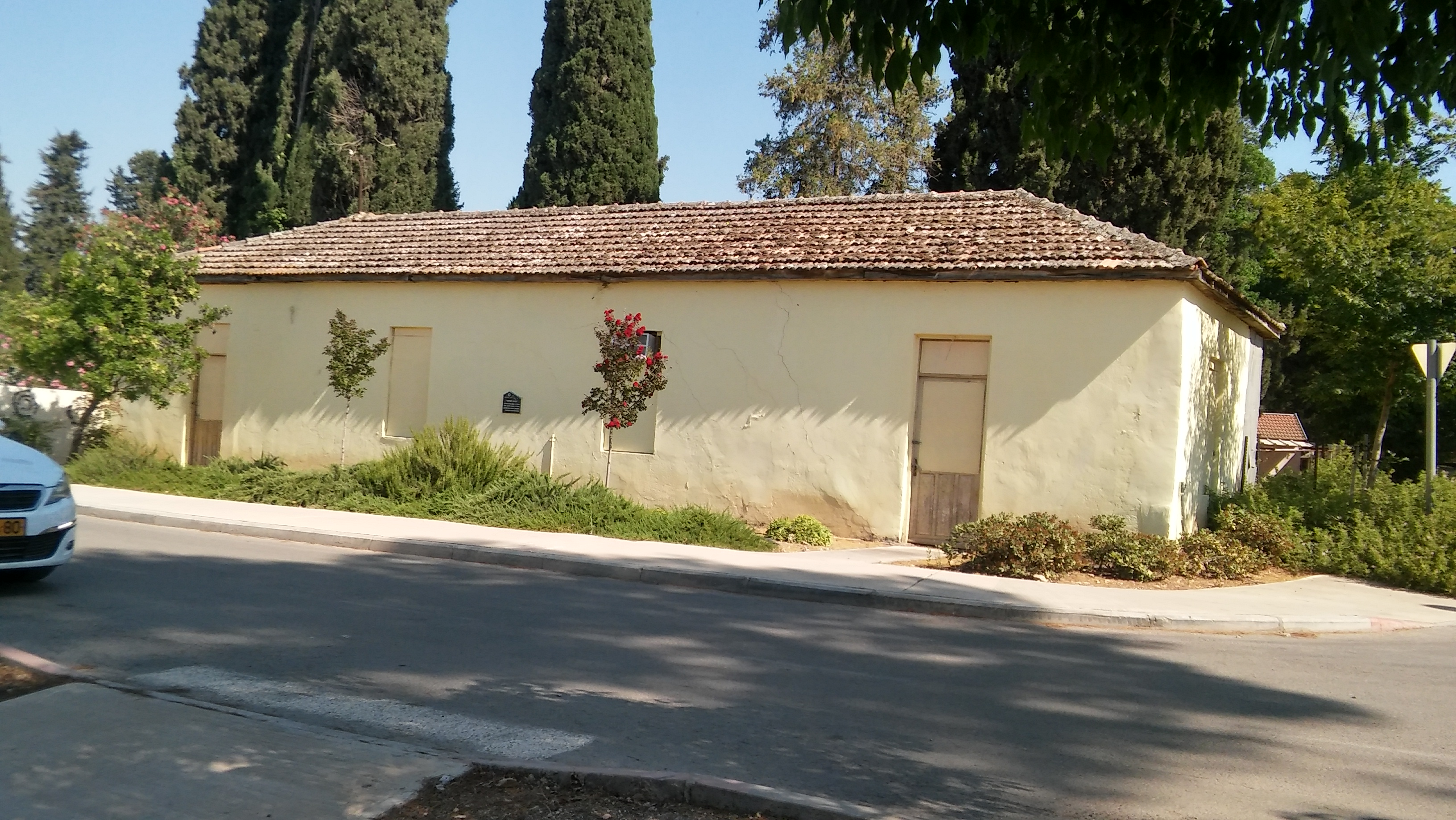 איילת השחר - מבני הפרסה - בית 6